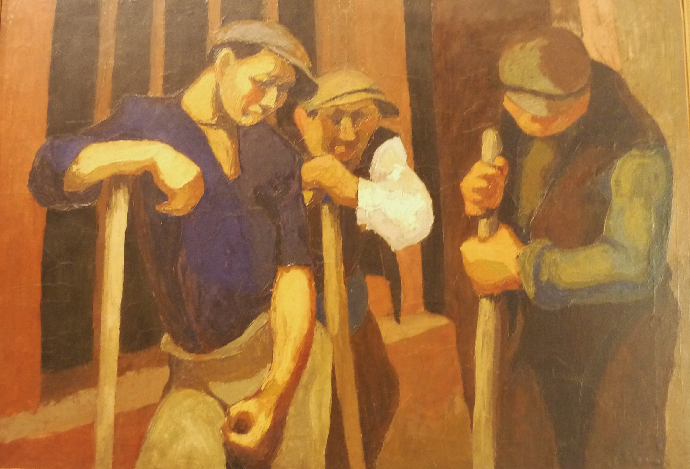 Maurice Le Scouëzec : Les ouvriers (Montparnasse, 1925, huile sur papier marouflé sur toile)